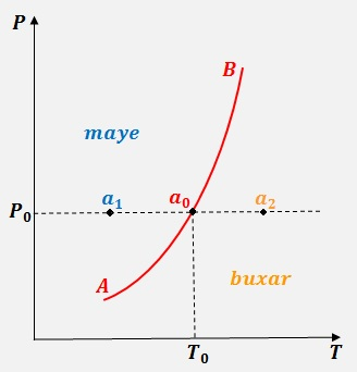 Şəkil 1. Fazaların tarazlıq əyrisi